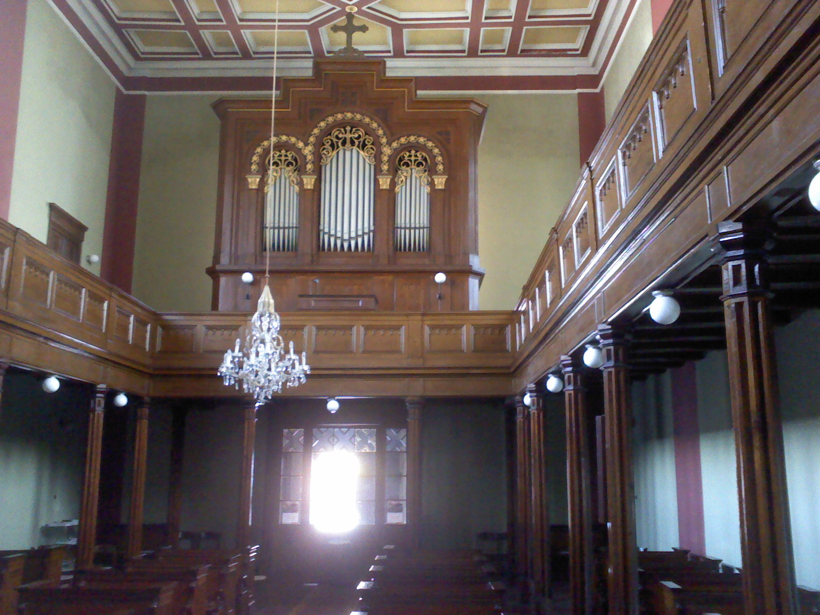 Orgle v Evangeličanski cerkvi Primoža Trubarja v Ljubljani